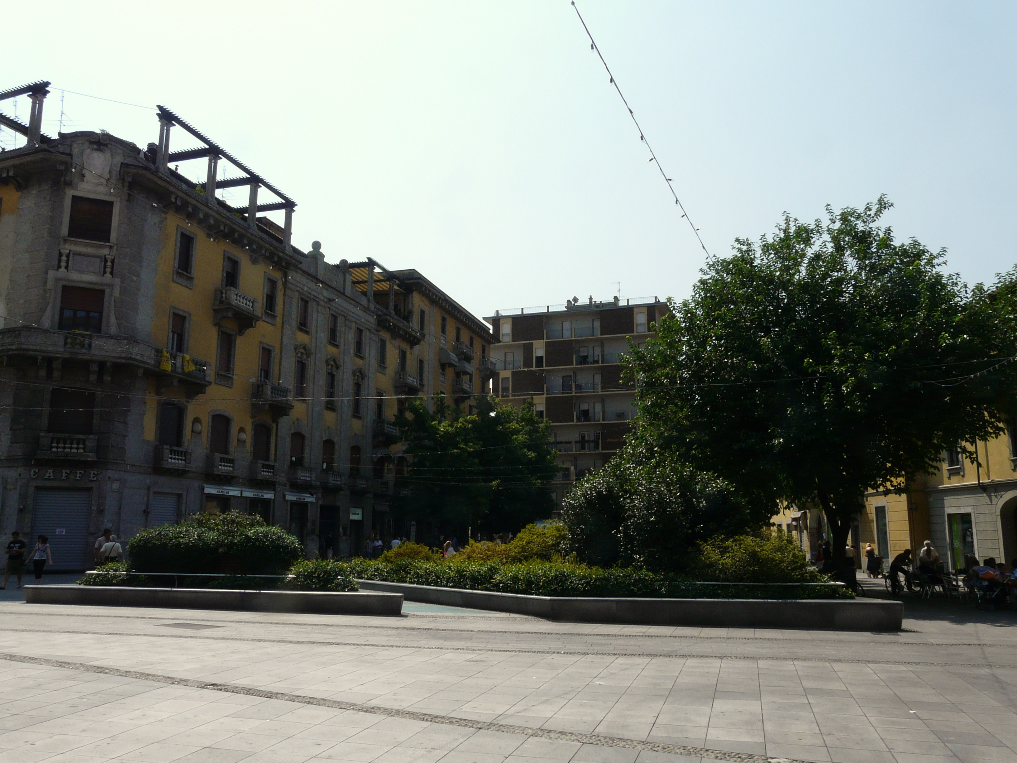 Piazza Liberazione, Magenta, Lombardia, Italia